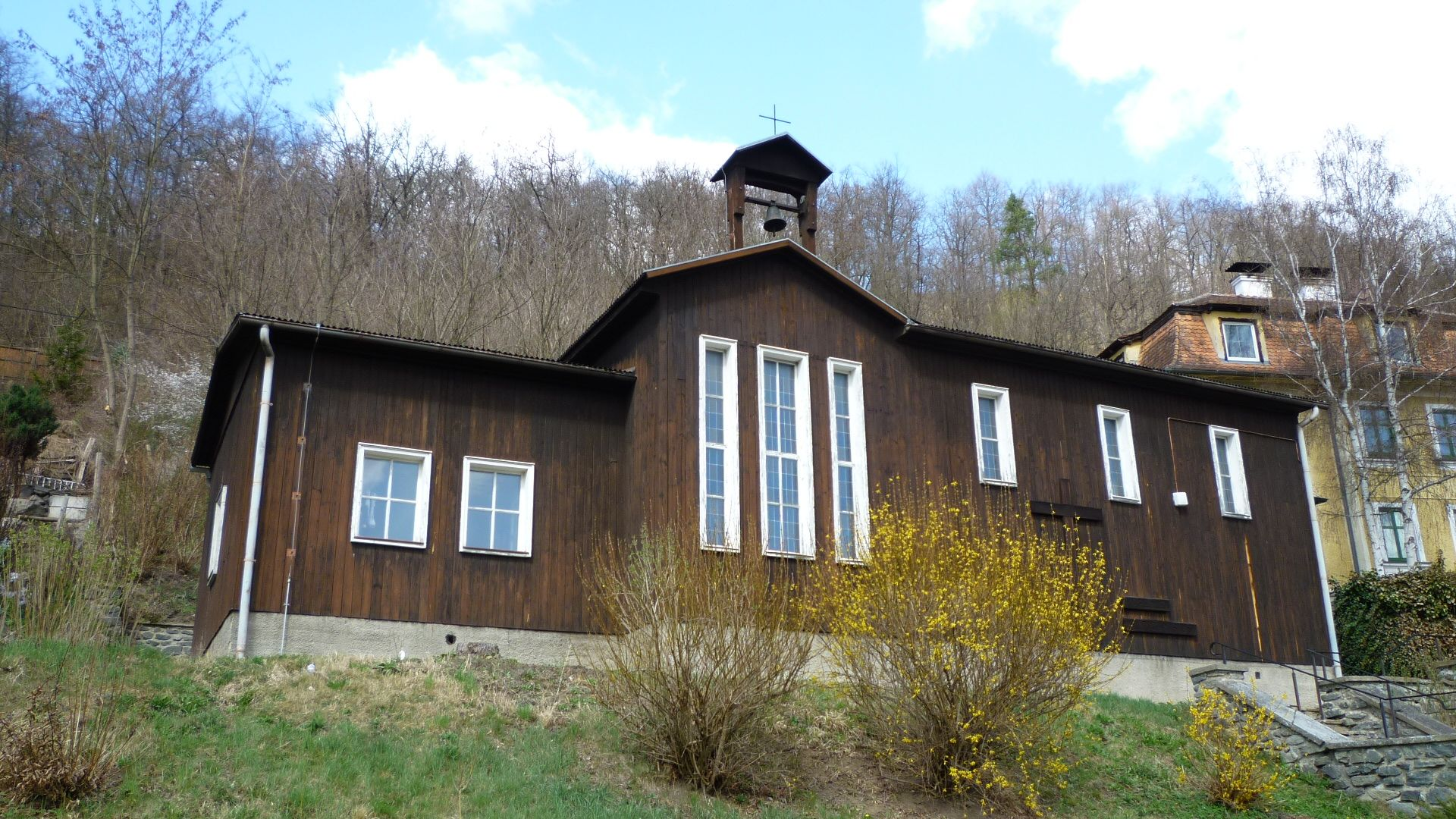 Canisius-Kapelle in Rosenburg, Gemeinde Rosenburg-Mold, Niederösterreich